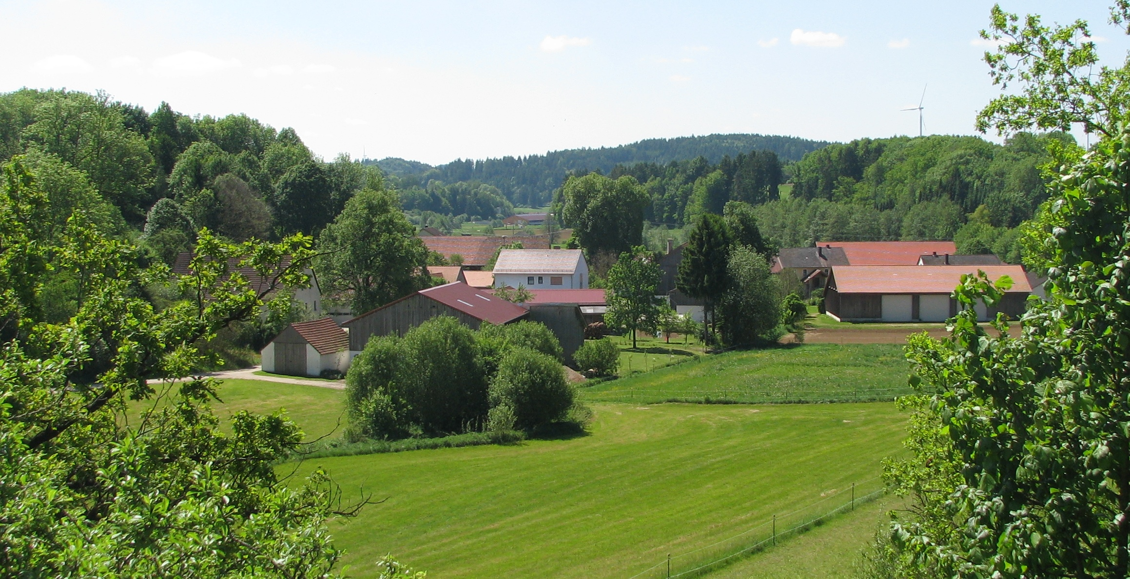 Eschertshofen, Ortsteil der Gemeinde Pilsach im Landkreis Neumarkt i. d. Opf.